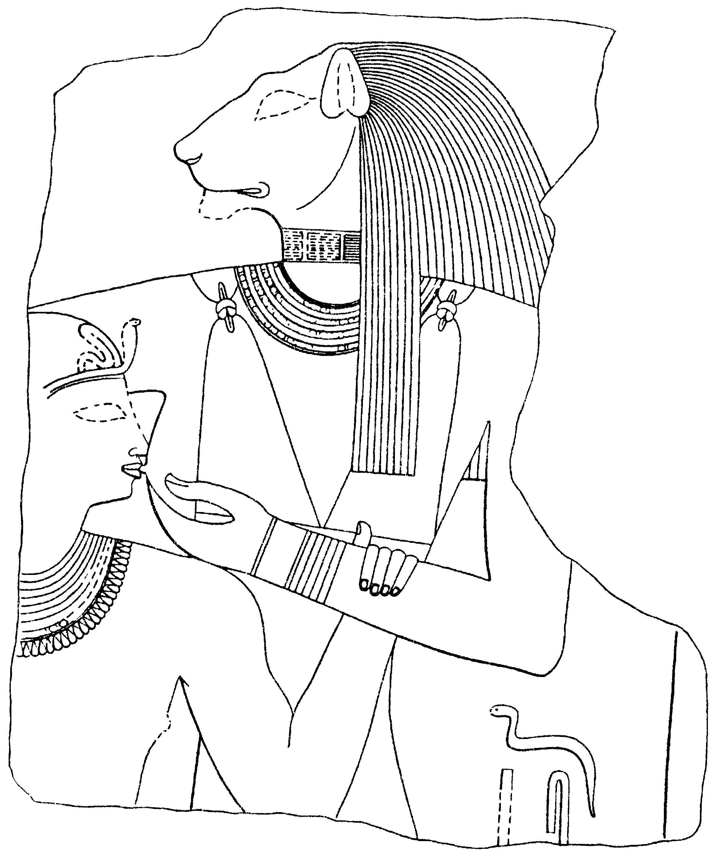 Bohyně Sachmet kojí panovníka Niuserrea; reliéfová výzdoba zádušního chrámu králova pyramidového komplexu